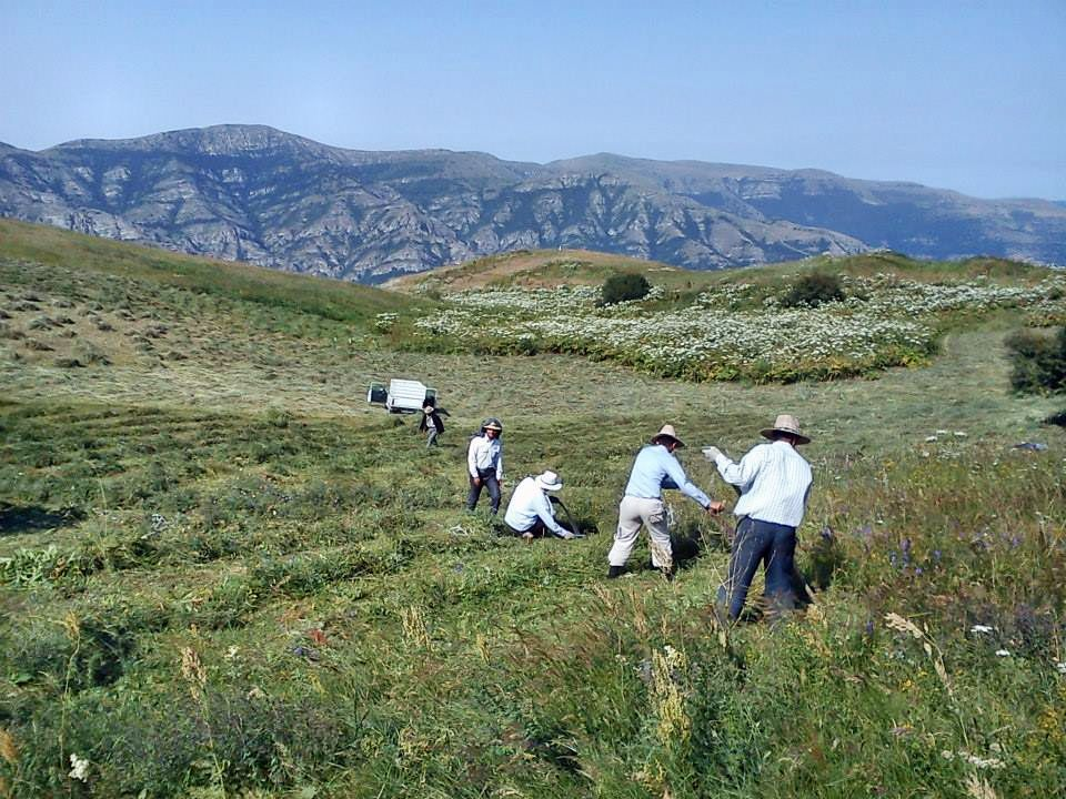 دروي علوفه دامي از مراتع آرپاچوخوري خان كندي در تابستان